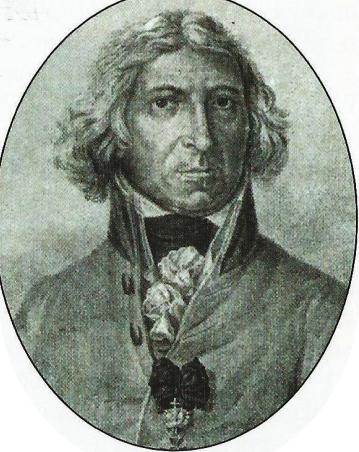 Jakub Wimmer, svobodný pán z Wimmeru, český podnikatel, velkostatkář, mecenáš a dobrodinec